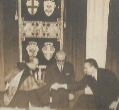 Inaugurazione Università di Verona